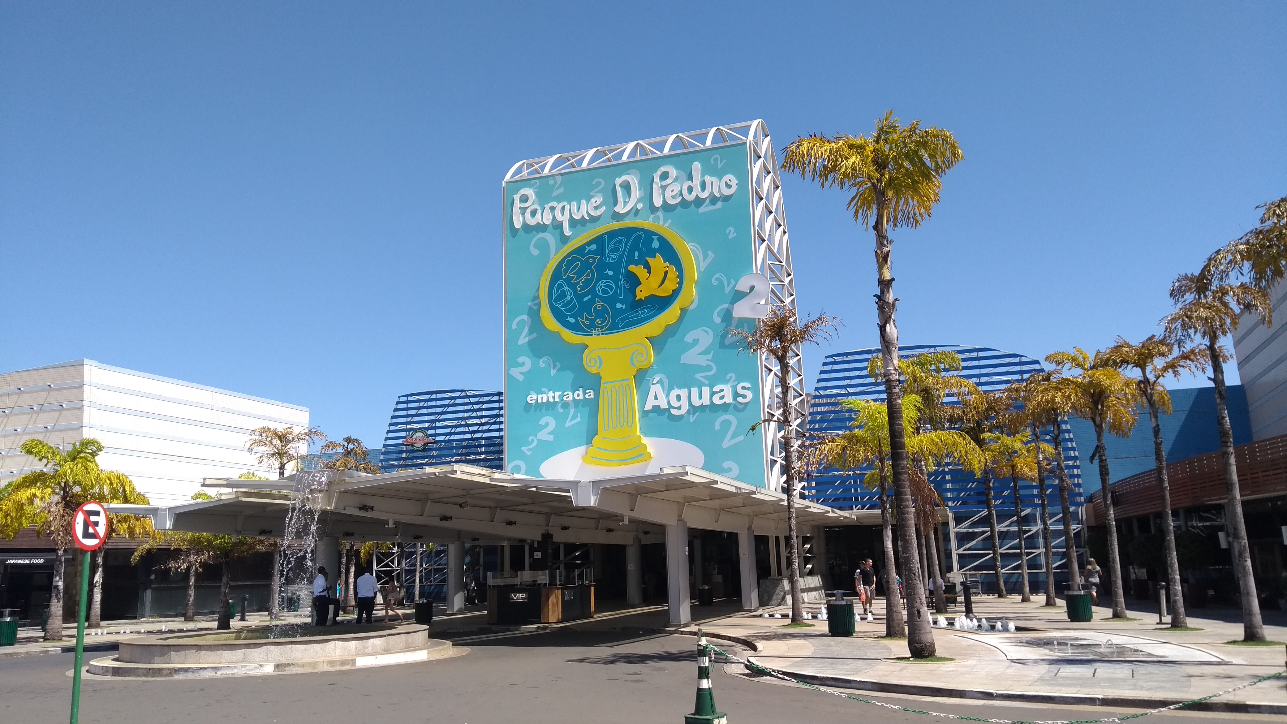 Entrada 2 das Águas